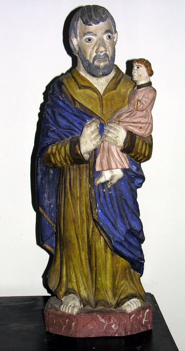 Šv. Juozapas Foto: Algirdas, 2005 m. lapkričio 3 d., Lietuva